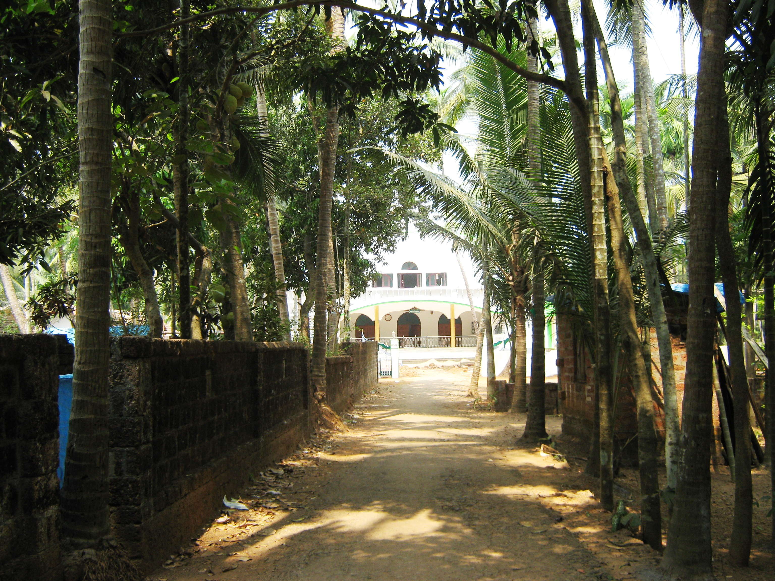 Olayam Masjidh, Kasargod, Kerala, India.